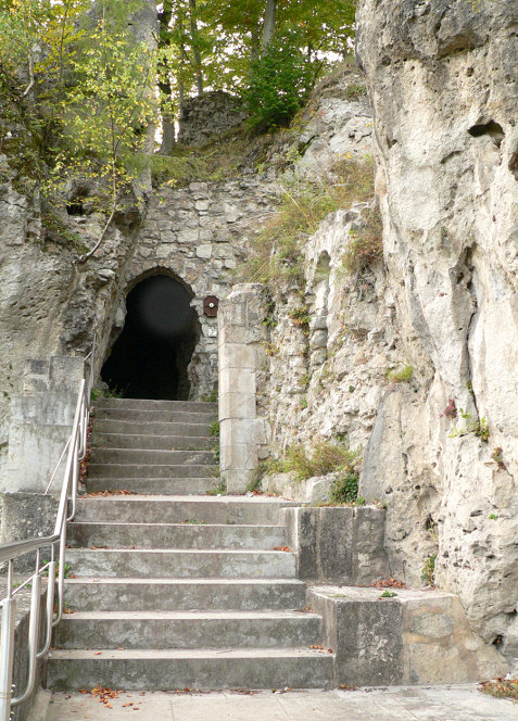 Eingang von Burg Scharzfels